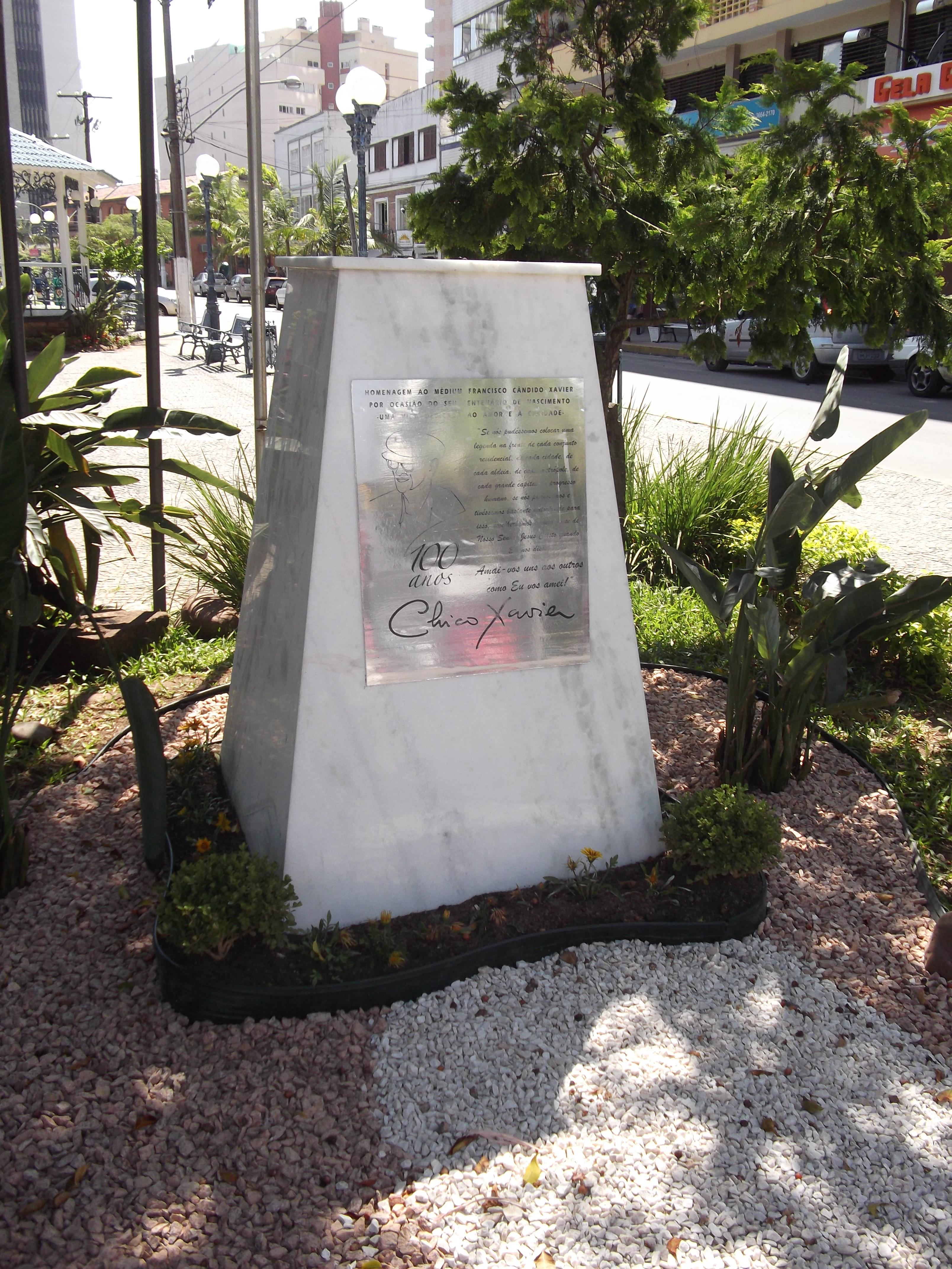 Torres